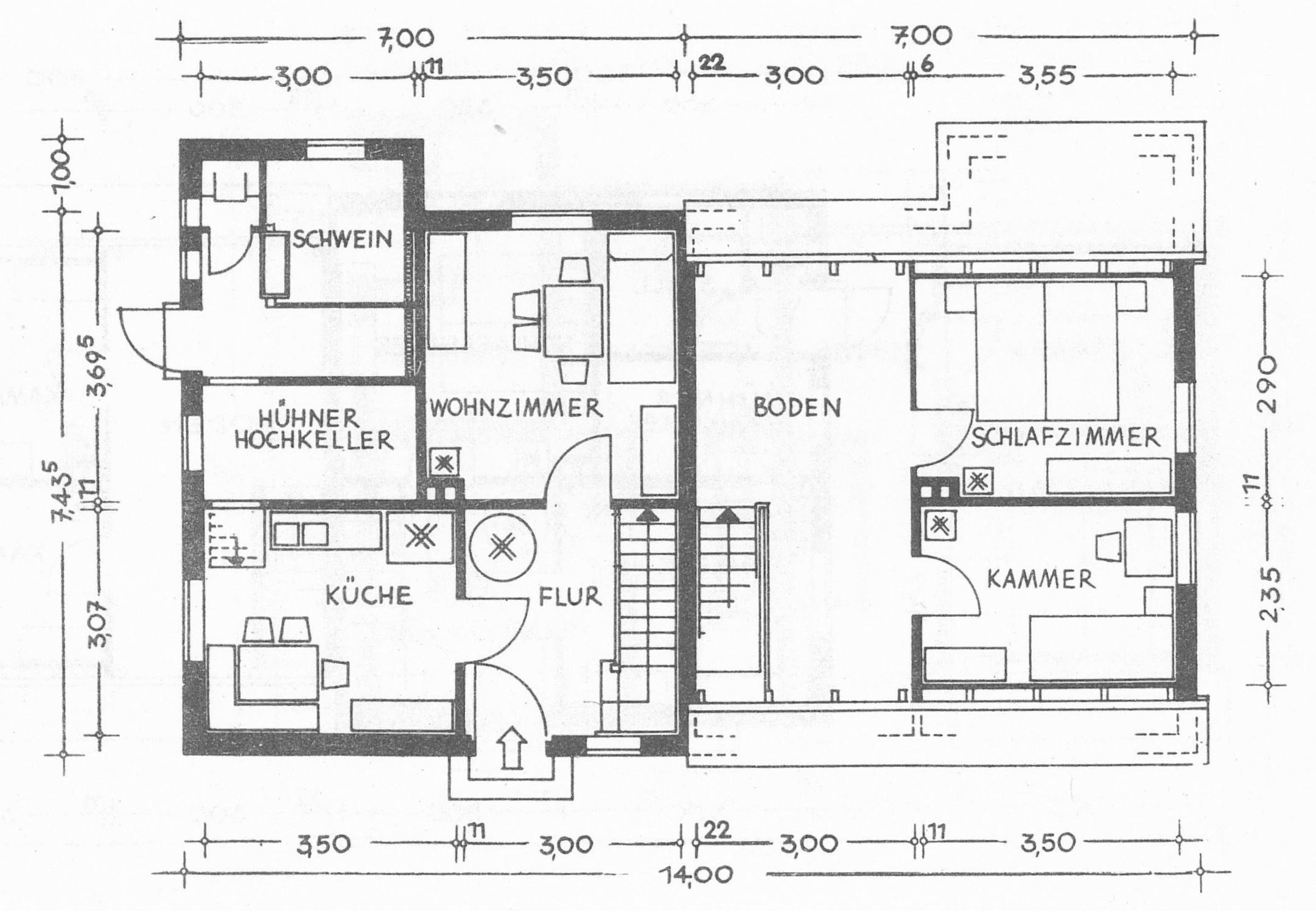 Muster-Grundrisszeichnung eines Kleinsiedlungsgebäudes aus dem Jahr 1951 aus Schleswig-Holstein